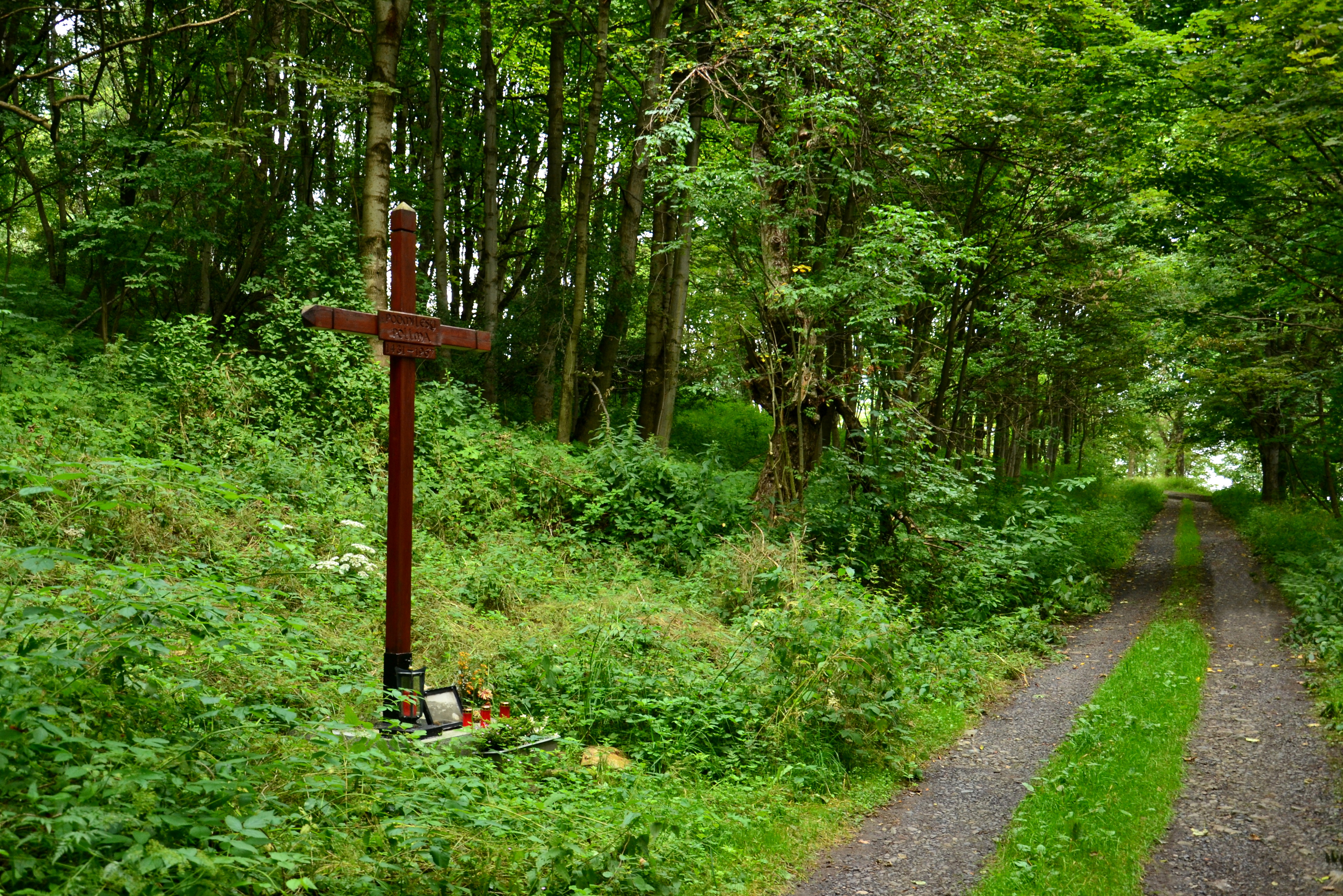 Kříž u Podmileského potoka připomíná zaniklou vesnici